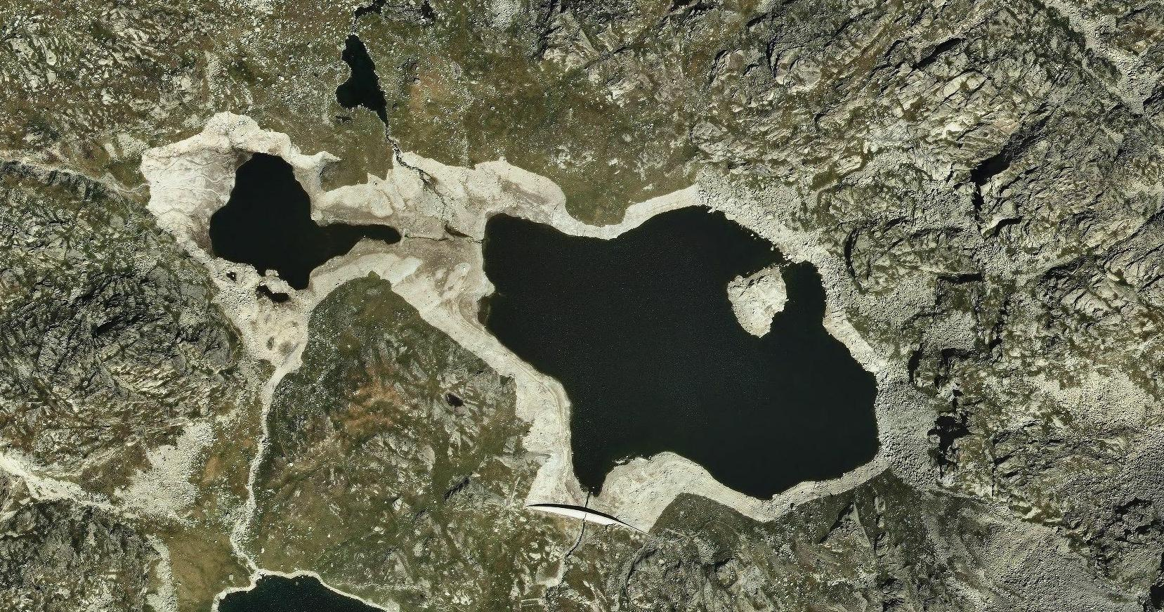 Els estanys Eixerola i Cubiesso queden separats quan la massa d'aigua és baixa This is a a photo of a natural area in Catalonia, Spain, with id: ES510081